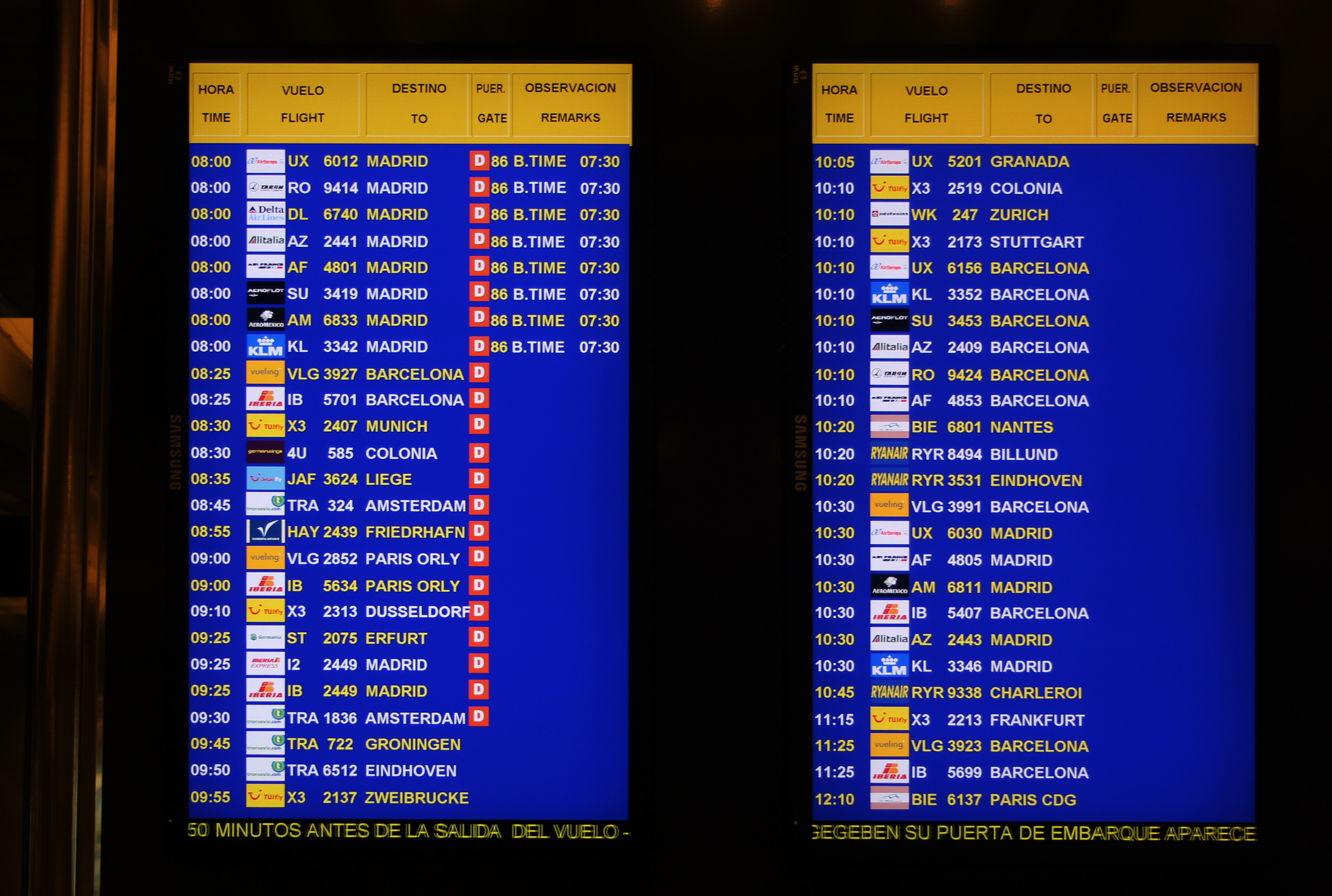 Bildschirme zur Anzeige der Abflüge am Flughafen Palma de Mallorca